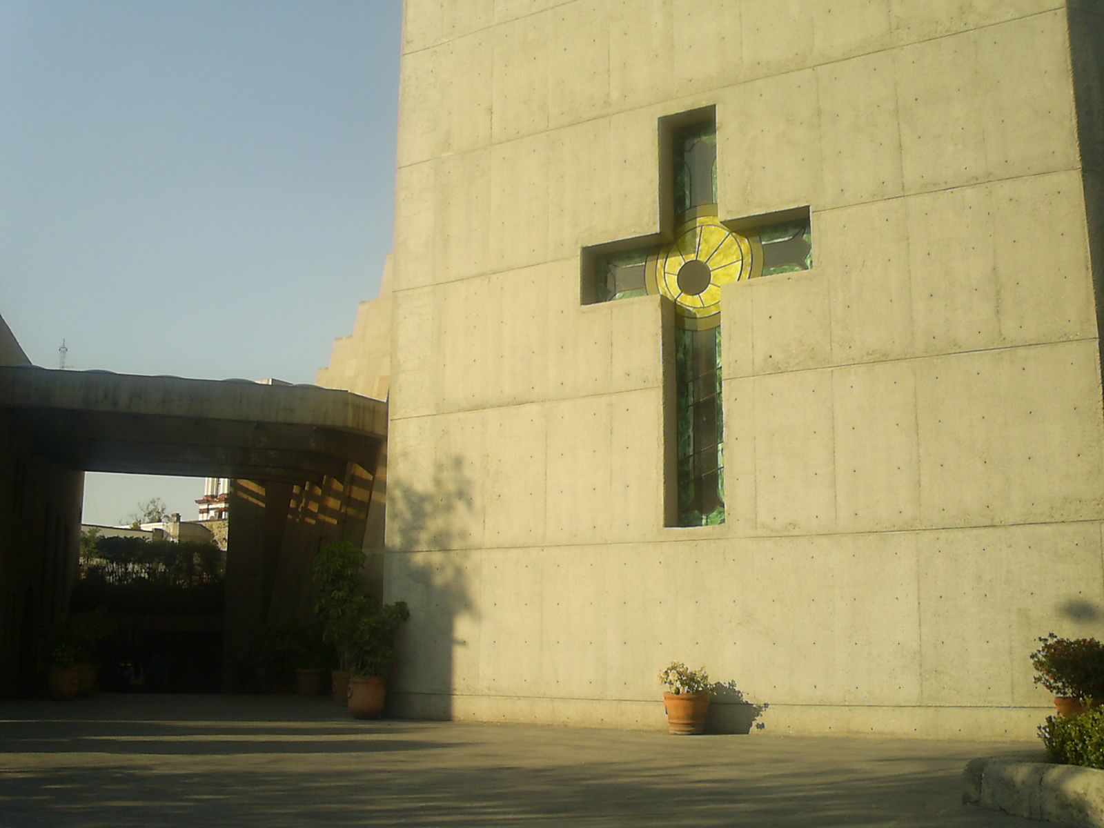 Catedral de Ecatepec entrada lateral sur